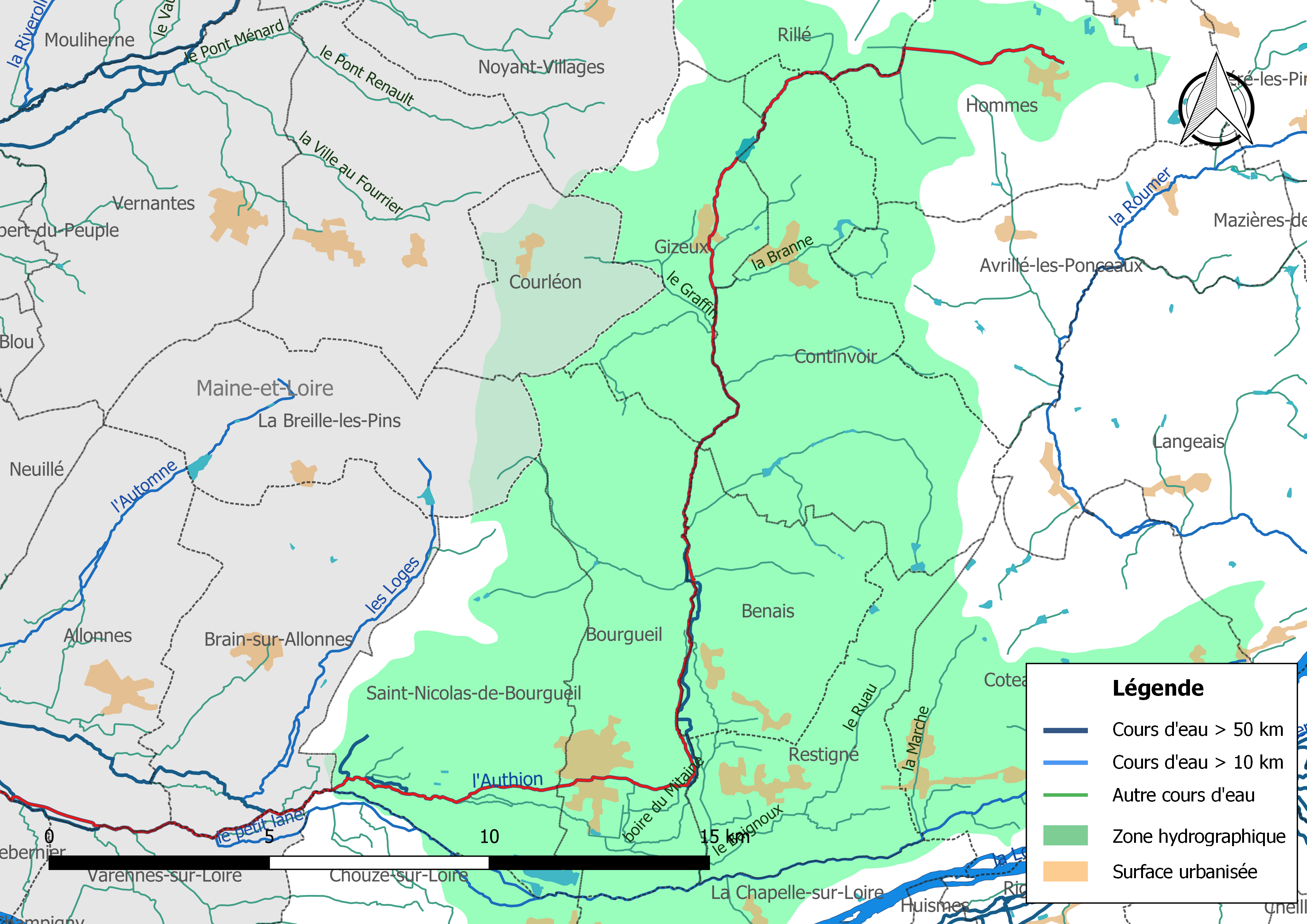 Carte du cours d'eau « le Changeon » et de son bassin versant.